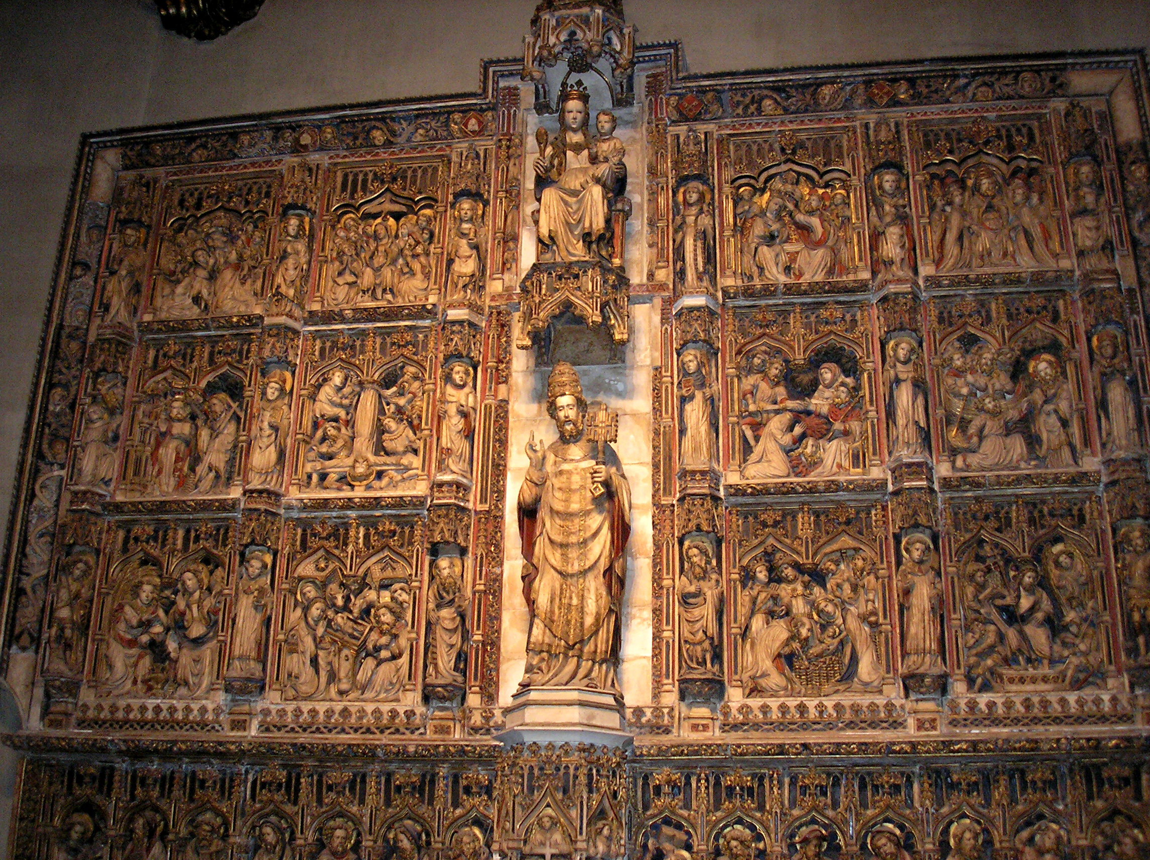 L'antic retaule major de la catedral es troba ara al deambulatori. És obra de Pere Oller, que el va realitzar entre els anys 1420 i 1428. Fou un encàrrec del canonge Bernat Despujol